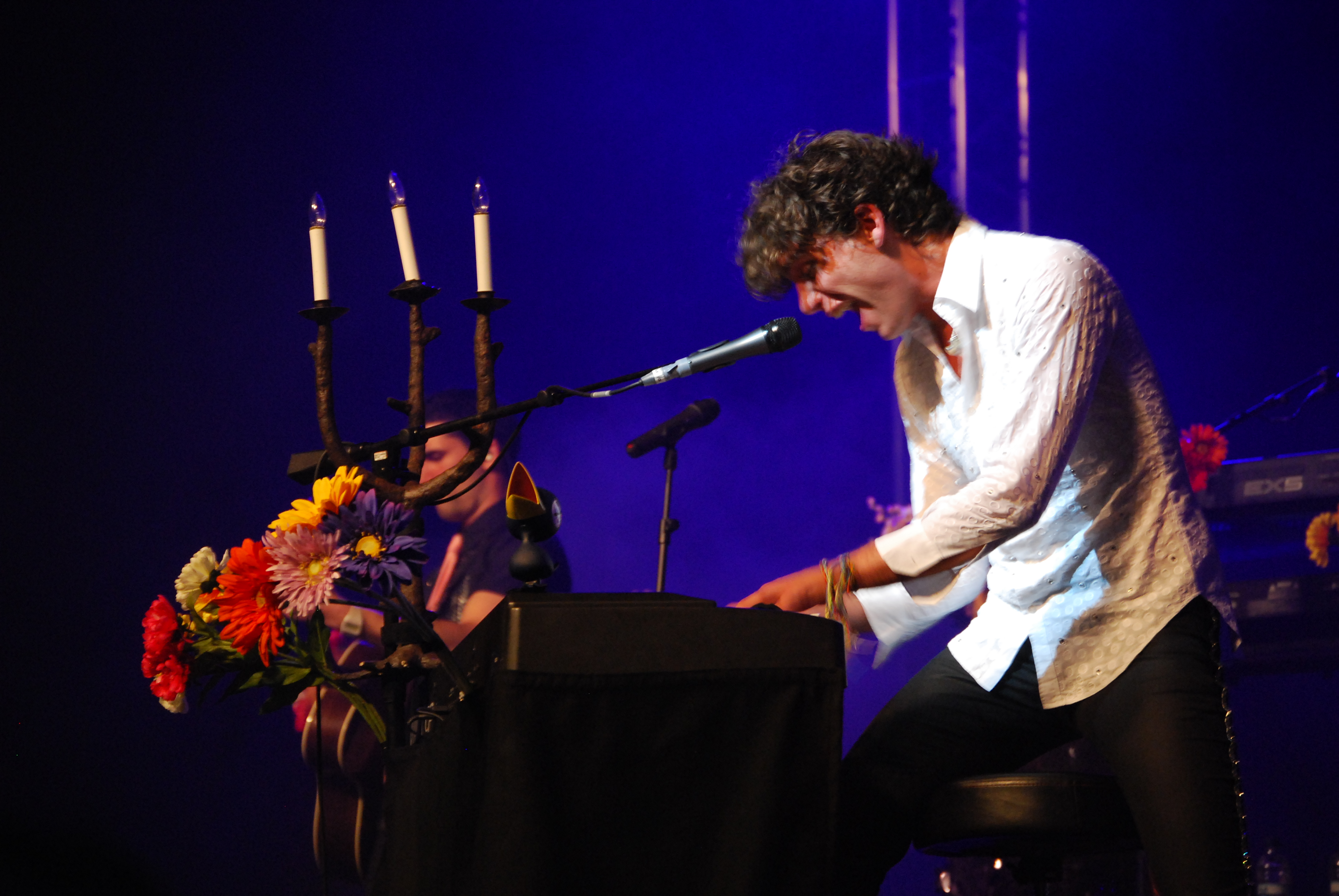 Mika tocando el piano.